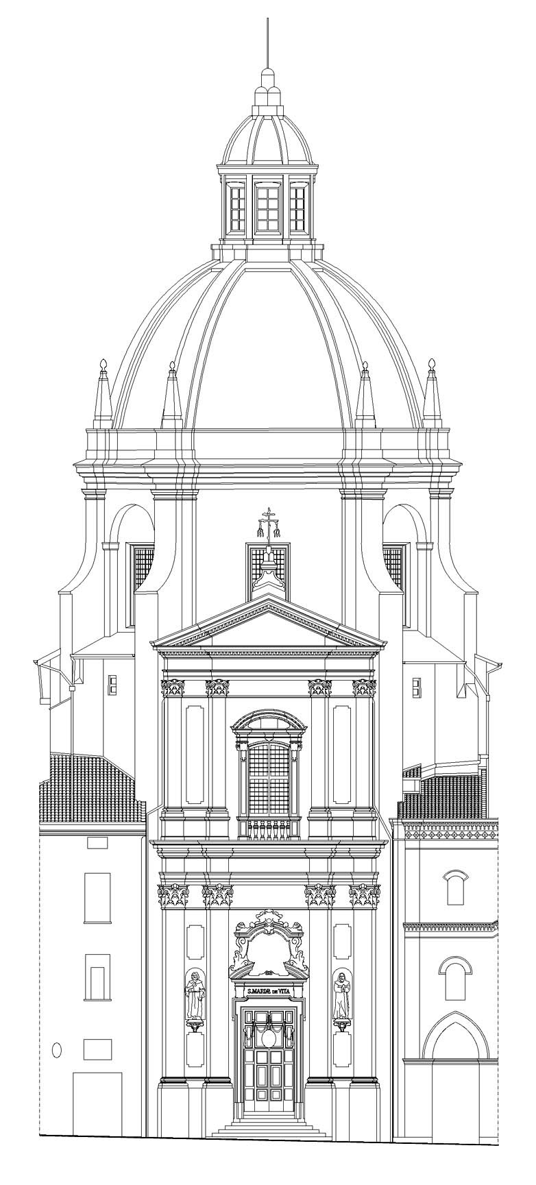 Santuario di Santa Maria della Vita